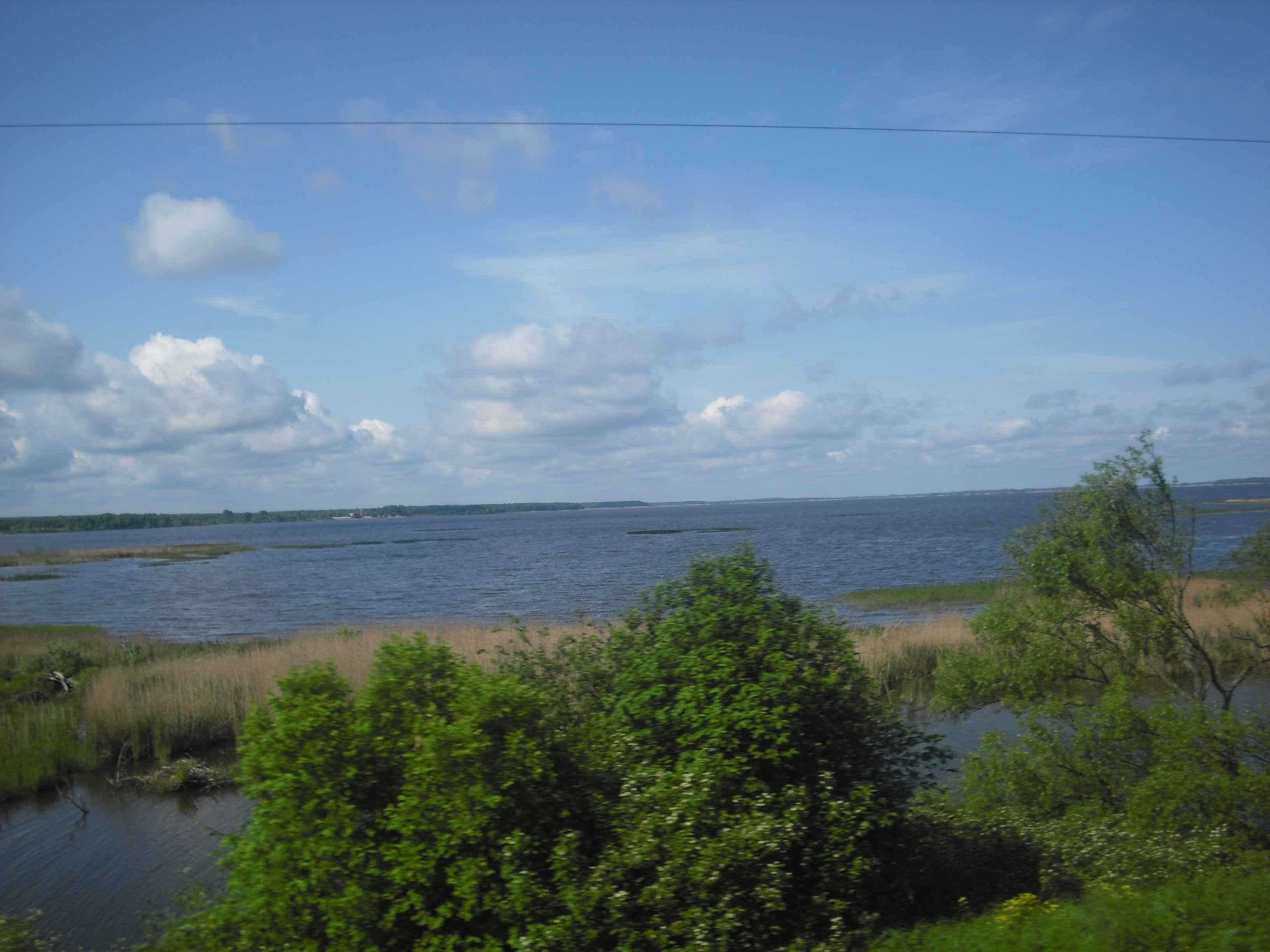 Вид на Иваньковское водохранилище с железной дороги Москва - Санкт-Петербург (Тверская область, Россия)